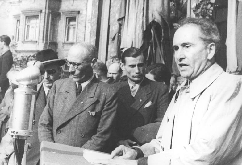 Zentralbild Paalzow Gründung der Deutschen Demokratischen Republik am 7.10.1949. Auf dem Hallmarkt in Halle fand am 8.10.1949 eine Kundgebung statt, auf der dieses historische Ereignis begrüßt wurde. UBz: Bernhard Koenen spricht zu den Kundgebungsteilnehmern. 4172-49